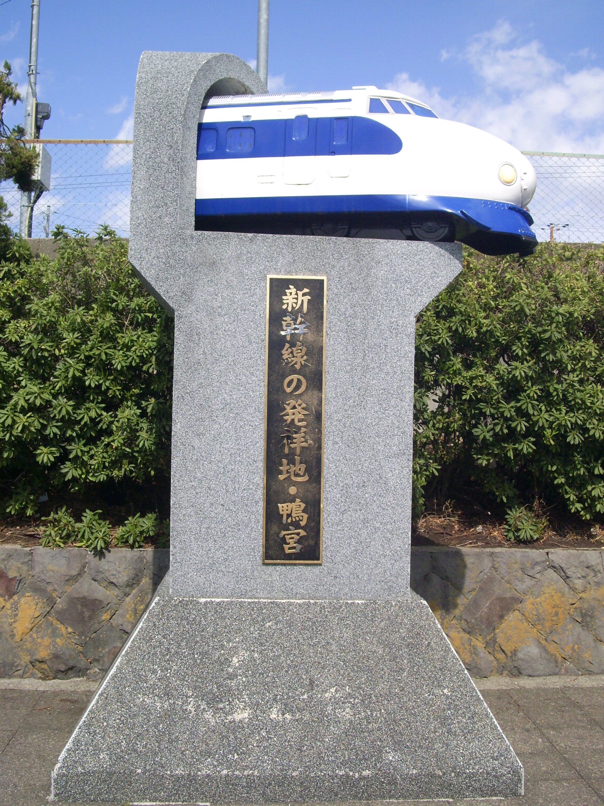 東海道線鴨宮駅南口に建つ「新幹線発祥の地・鴨宮」記念碑 ㊟カメラを起動すると日付機能が出荷時のものに初期化されるため、ファイル履歴の投稿日時とメタデータの原画像データの生成日時が異なります（本概要欄の下記日付が撮影日）